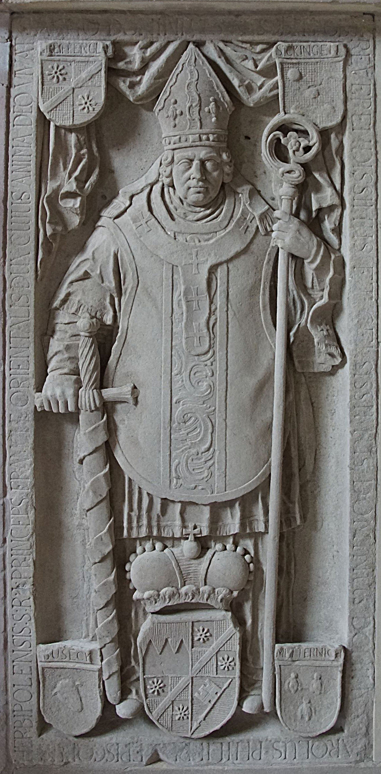 Grablege in der Marienkirche in der Festung Marienburg in Würzburg Karl Philipp von Greiffenclau zu Vollrads (1749-1754)